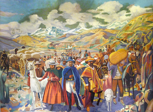 El Éxodo Jujeño, cuadro de pintor anónimo de mediados del siglo XX. (Museo Histórico Provincial de Jujuy).